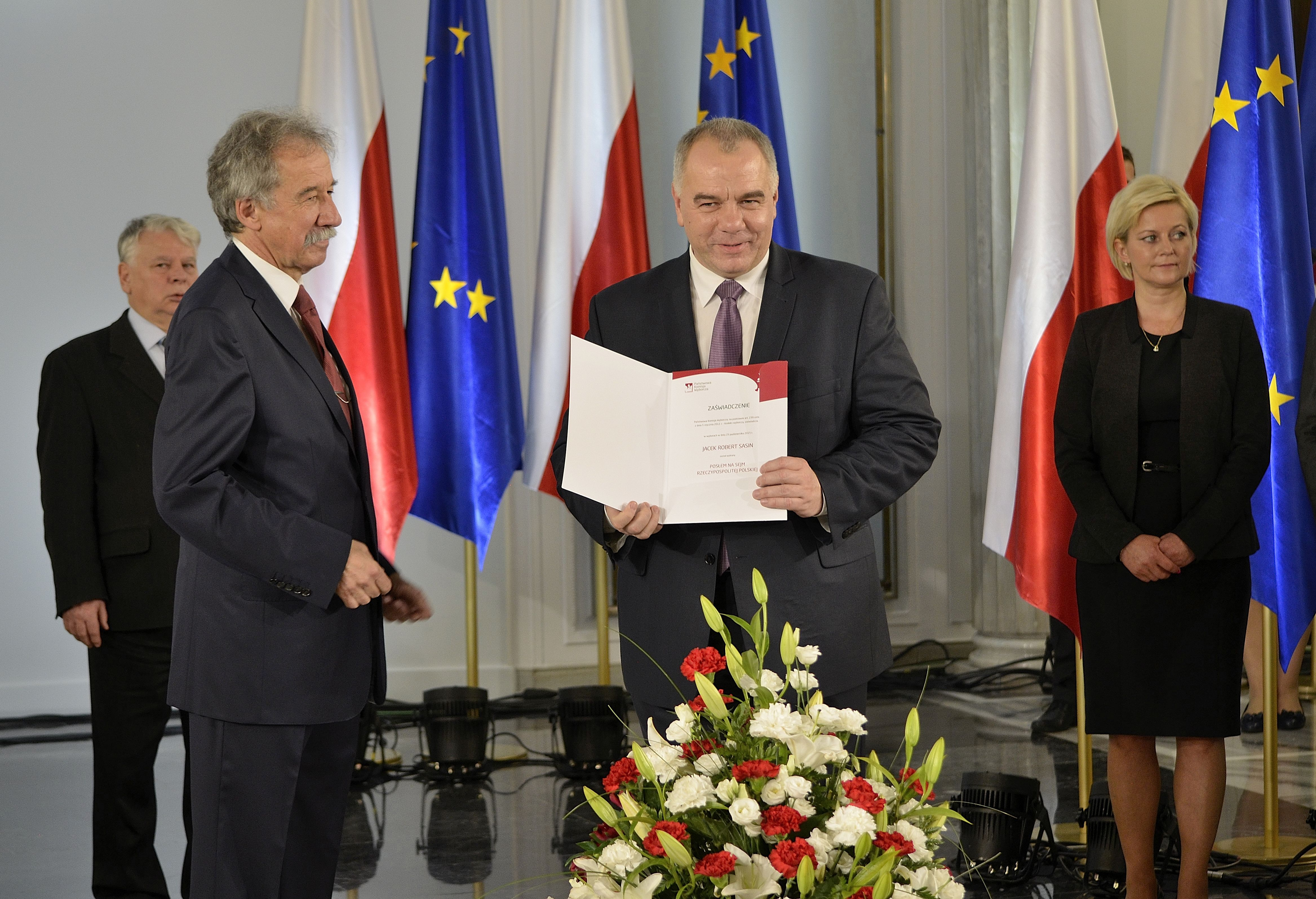 Poseł Jacek Sasin podczas uroczystości wręczenia zaświadczeń o wyborze nowo wybranym posłom w Sali Kolumnowej Sejmu